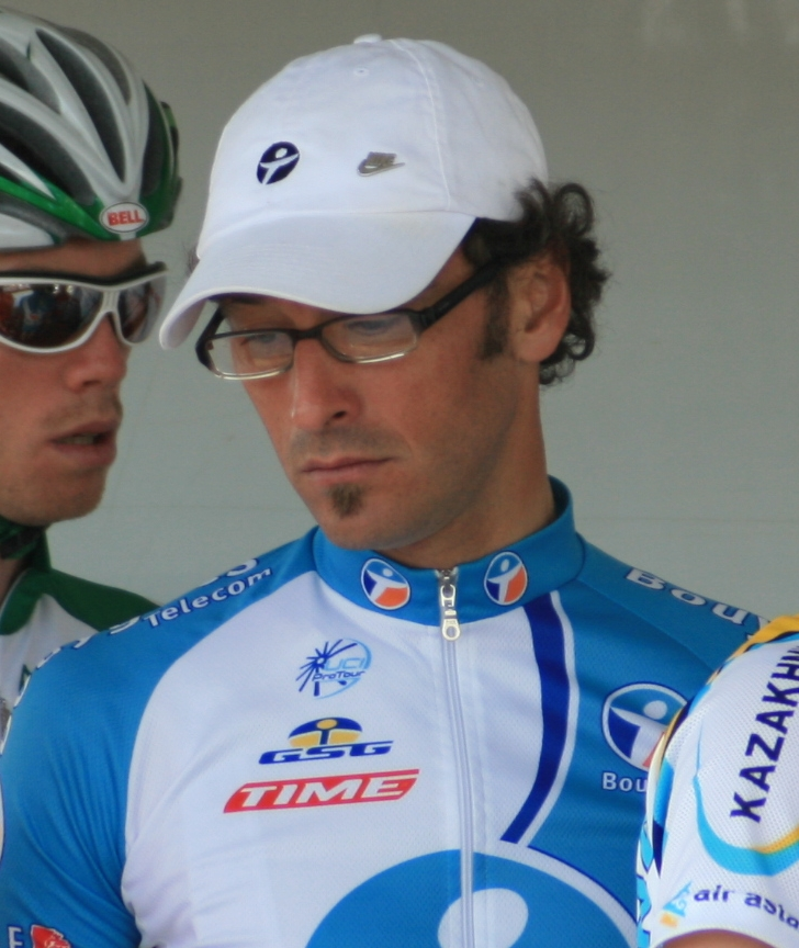 Franck Renier, à l'Eneco Tour 2008, à Ardooie